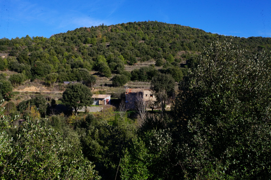 Cal Mestret als Cingles de Bertí-Serralada prelitoral. l'Ametlla del Vallès-Montmany-Bigues (Vallès Oriental, Catalunya)